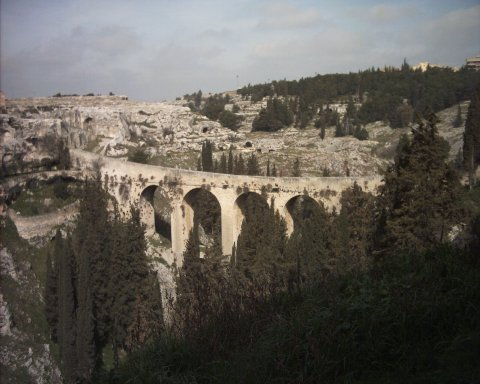 Foto di: Stone Cold Il ponte romano di Gravina in Puglia